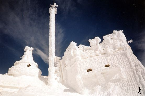 Sonnblickobservatorium